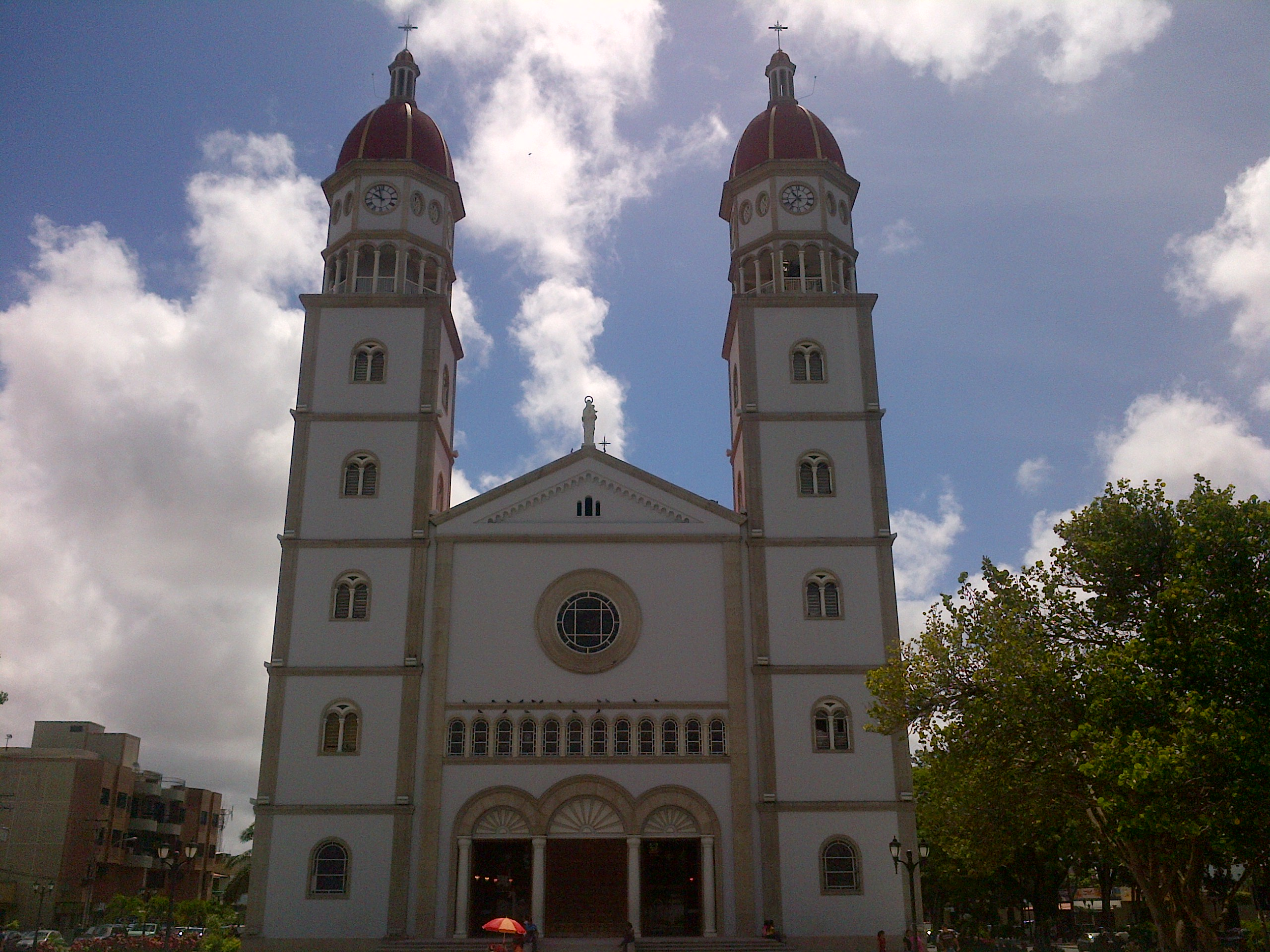 Vista frontal de la Catedral de Nuestra Señora del Carmen, ubicada en Maturín, Venezuela.